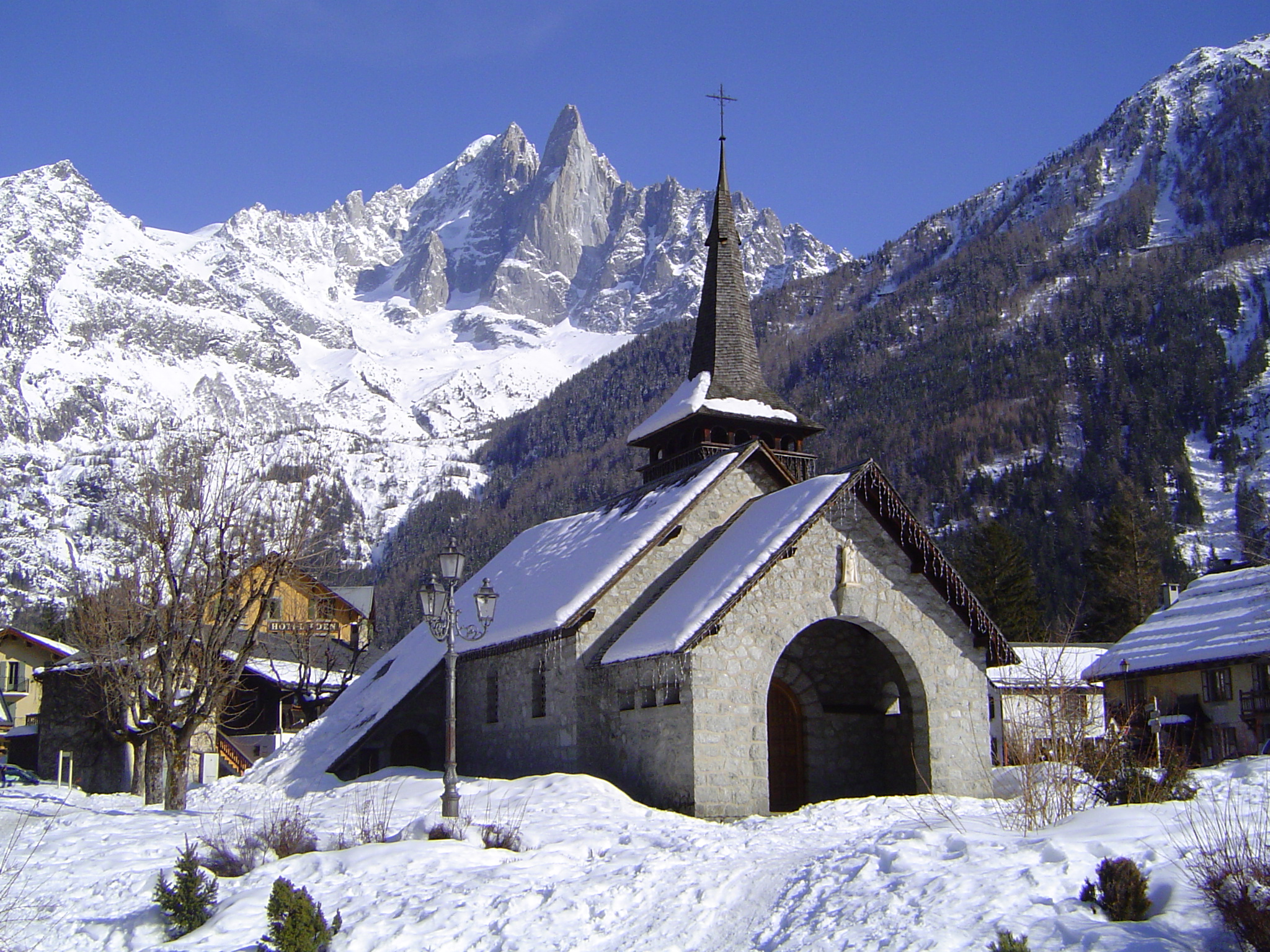 Photo prise dans la commune de Chamonix-Mont-Blanc en France